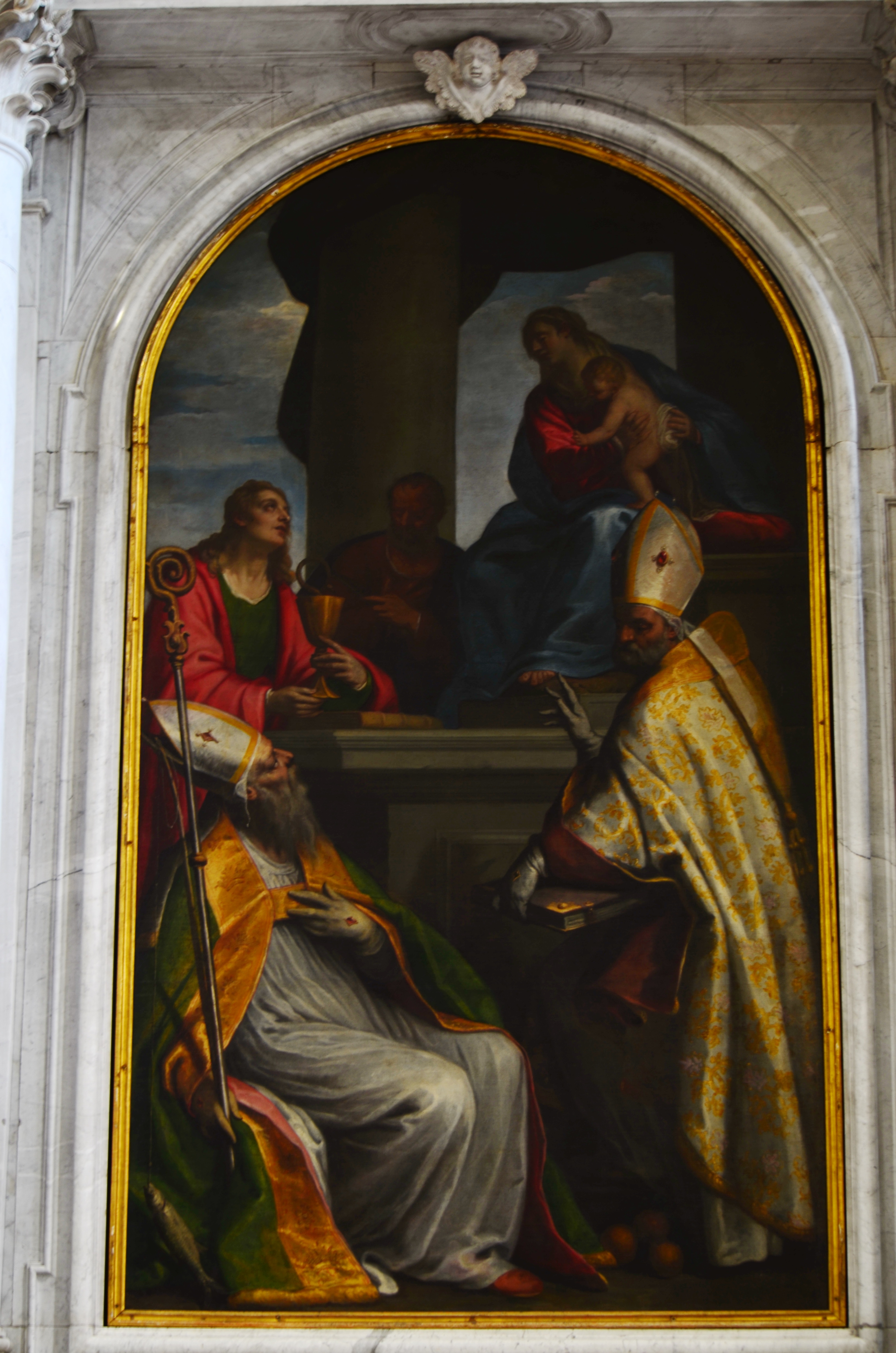 Duomo di Cividale - Interno Altare con Madonna e Santi